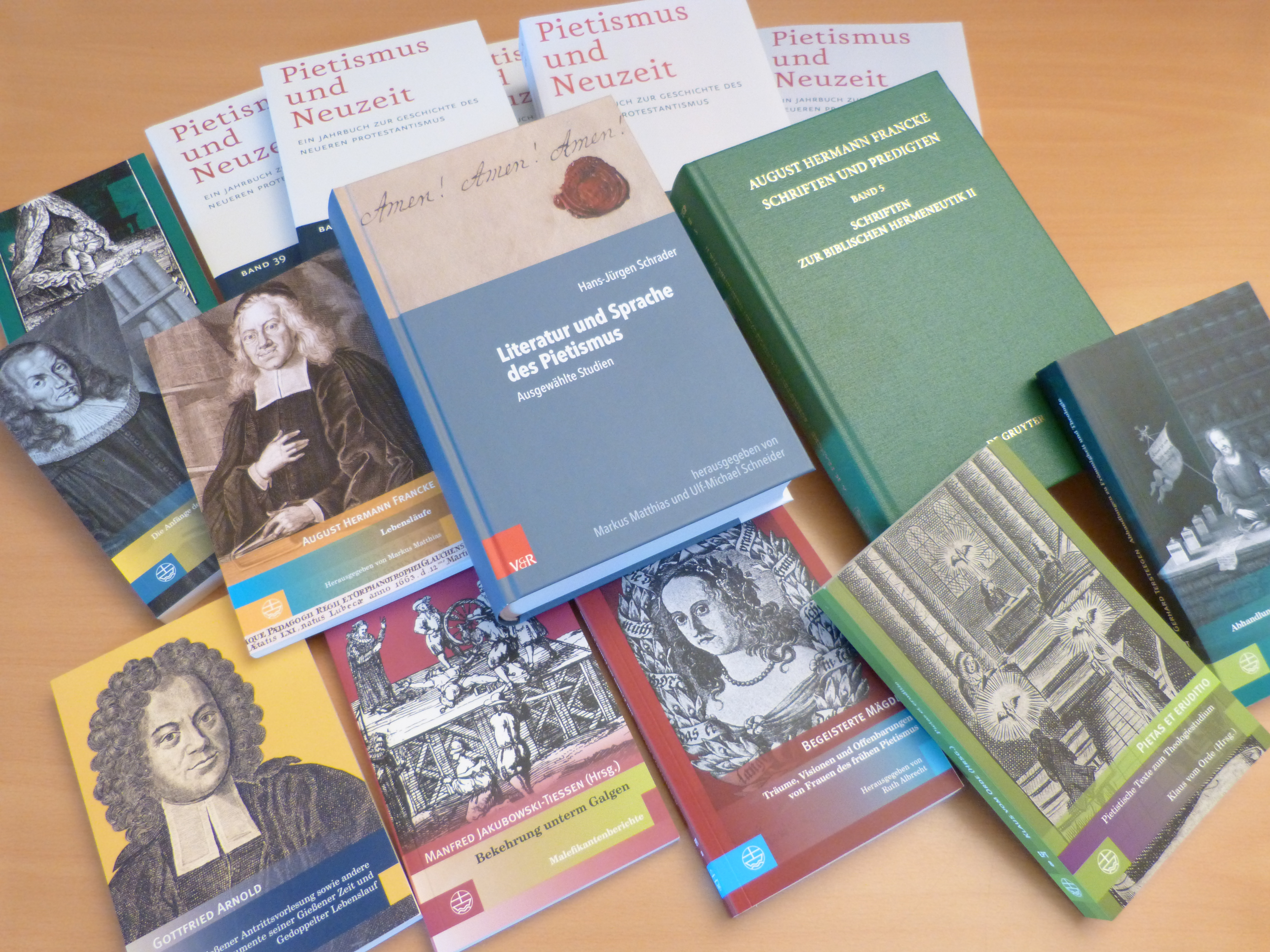 Auswahl diverser Schriften verschiedener Reihen, die zwischen 2011 und 1019 von der Historischen Kommission in verschiedenen Verlagen publiziert wurden.